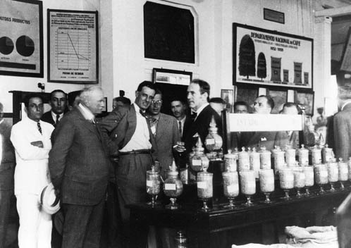 Oswaldo Aranha visita a Feira de Amostras no Departamento Nacional do Café, 1933. Rio de Janeiro (RJ). (CPDOC/ OA foto 105/3)